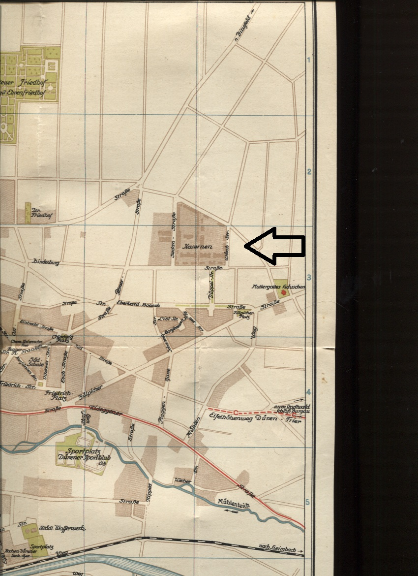 Plan aus den 1920er Jahren